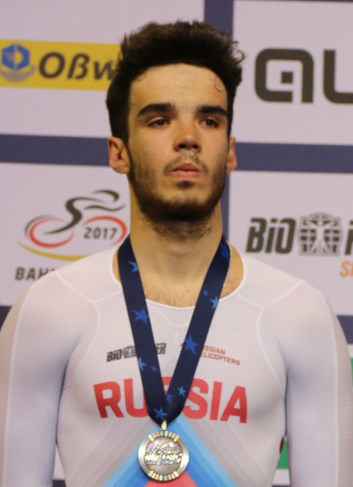 Maksim Piskunow, russicher Radsportler - Silber im Ausscheidungsfahren